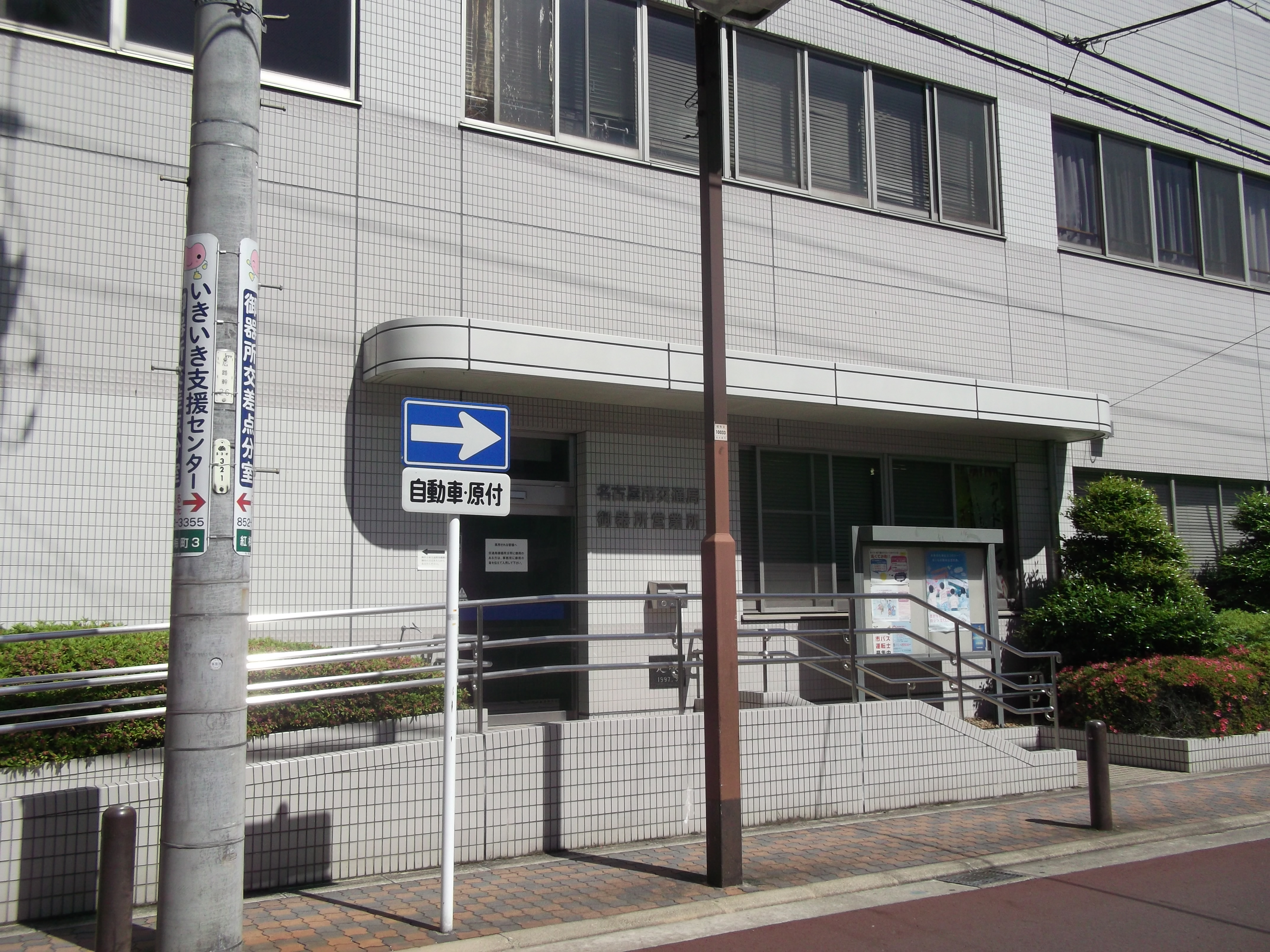 名古屋市昭和区の名古屋市交通局猪高営業所御器所分所を西側公道から写す